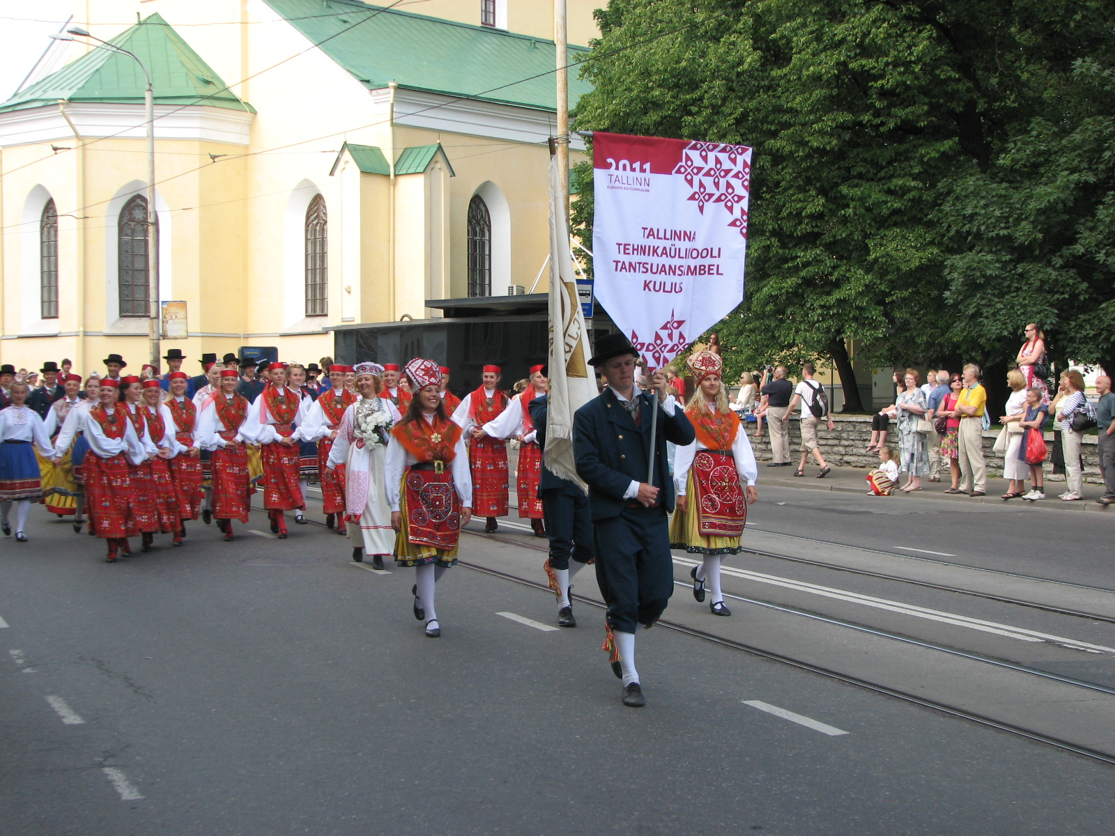 TTÜ tantsuansambel Kuljus XI noorte laulu- ja tantsupeo rongkäigus